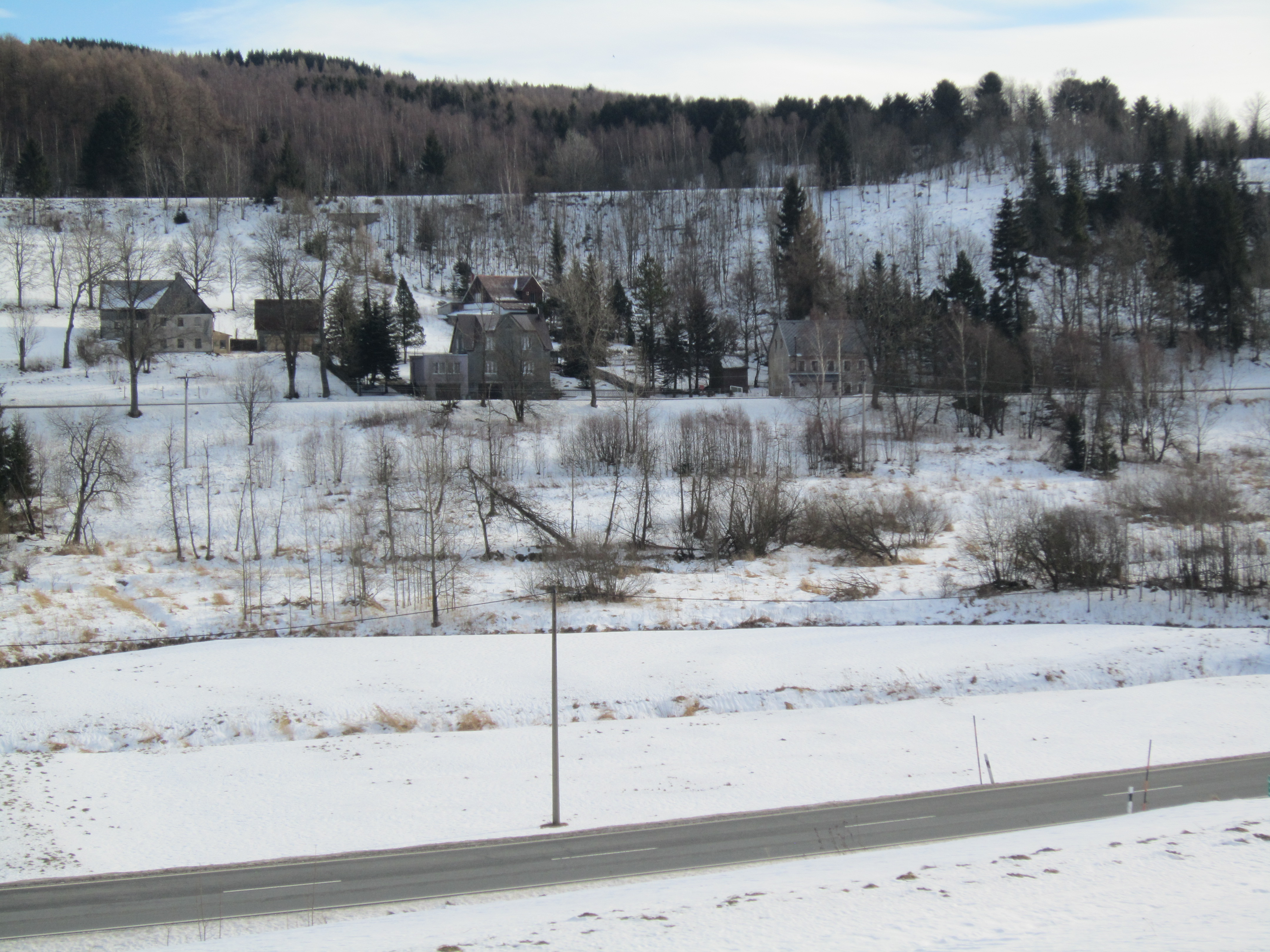 Pöhlbachtal. Im Vordergrund die B 95, im Hintergrund Tschechien.